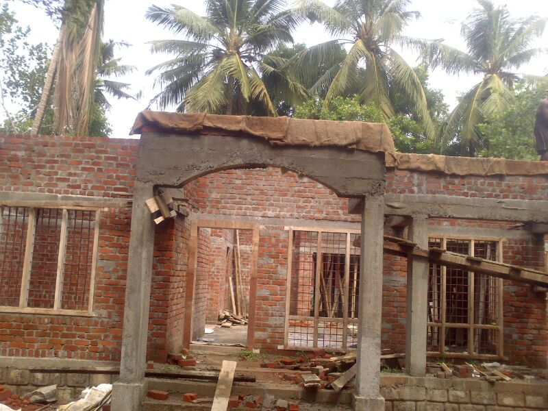 കെട്ടിട നിർമ്മാണം